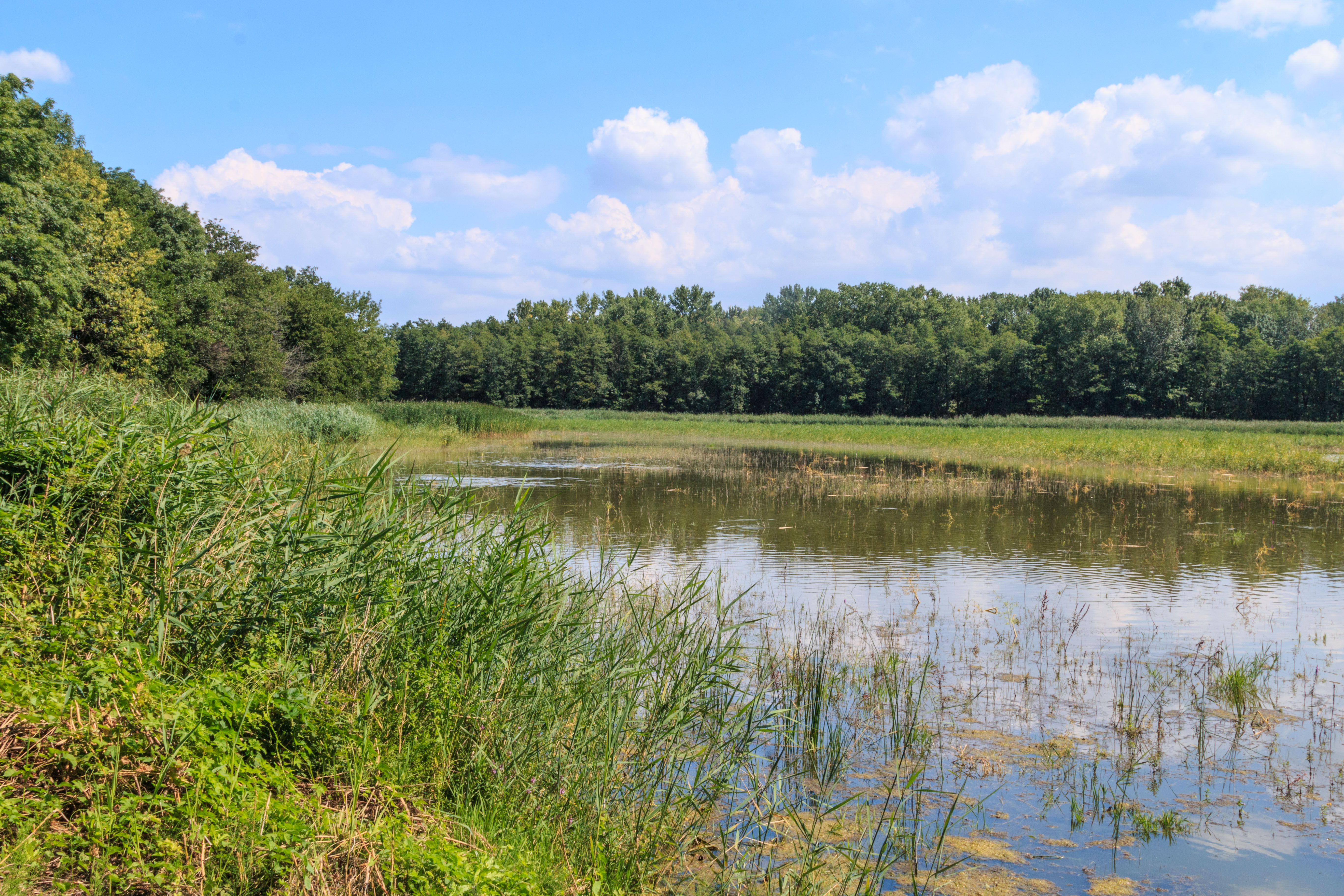 Rybník Lačnov u Zálší Project: Vodstvo.